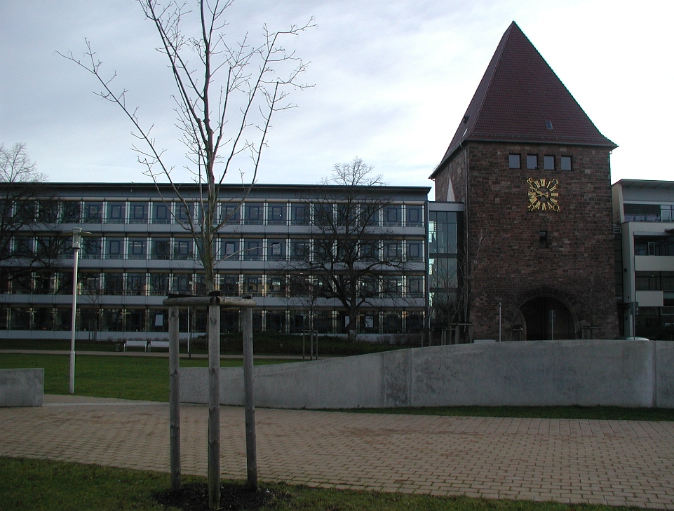 Landratsamt Fürth